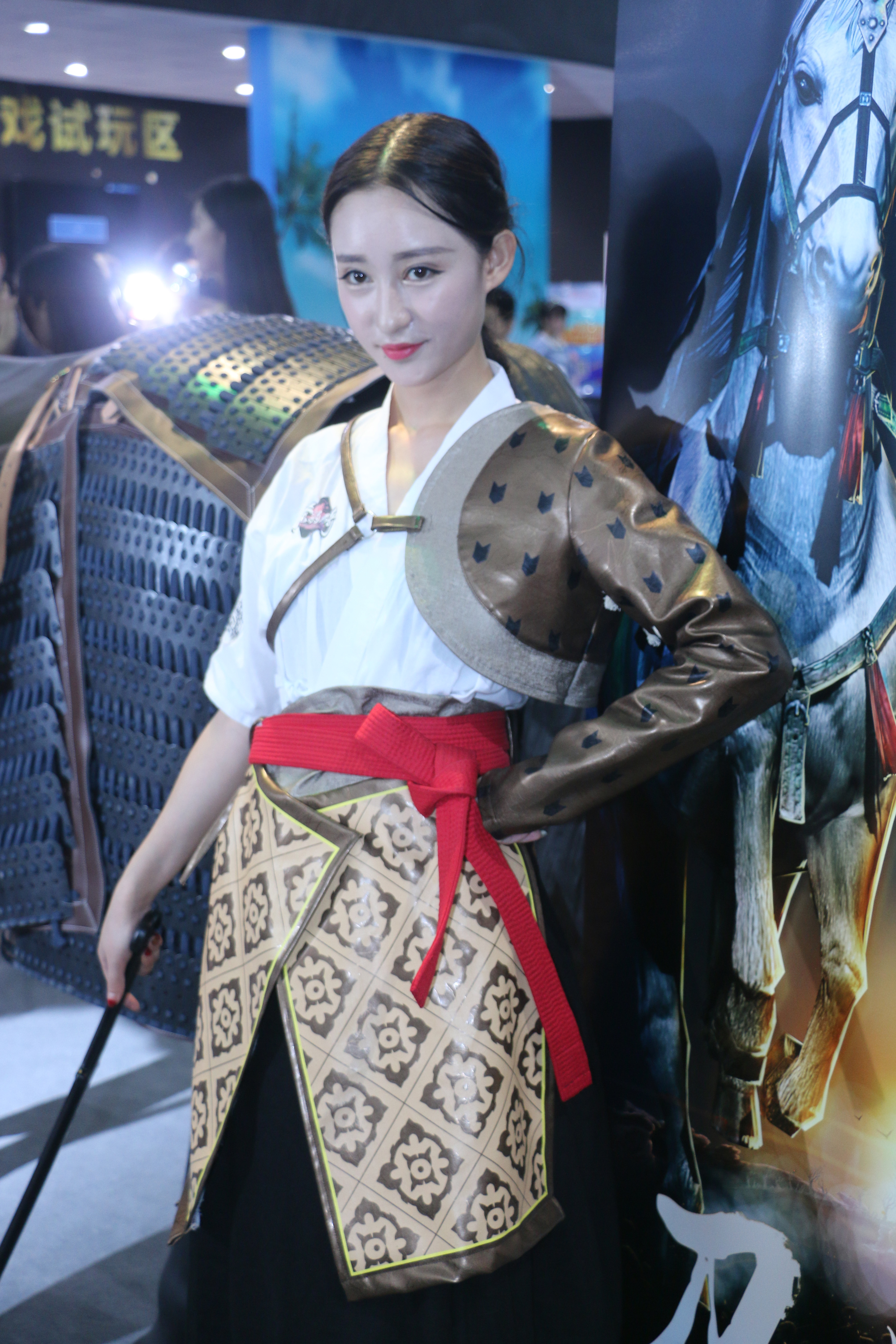 2015ChinaJoy SG美女 第三集(推荐)，美好事物会有多遍